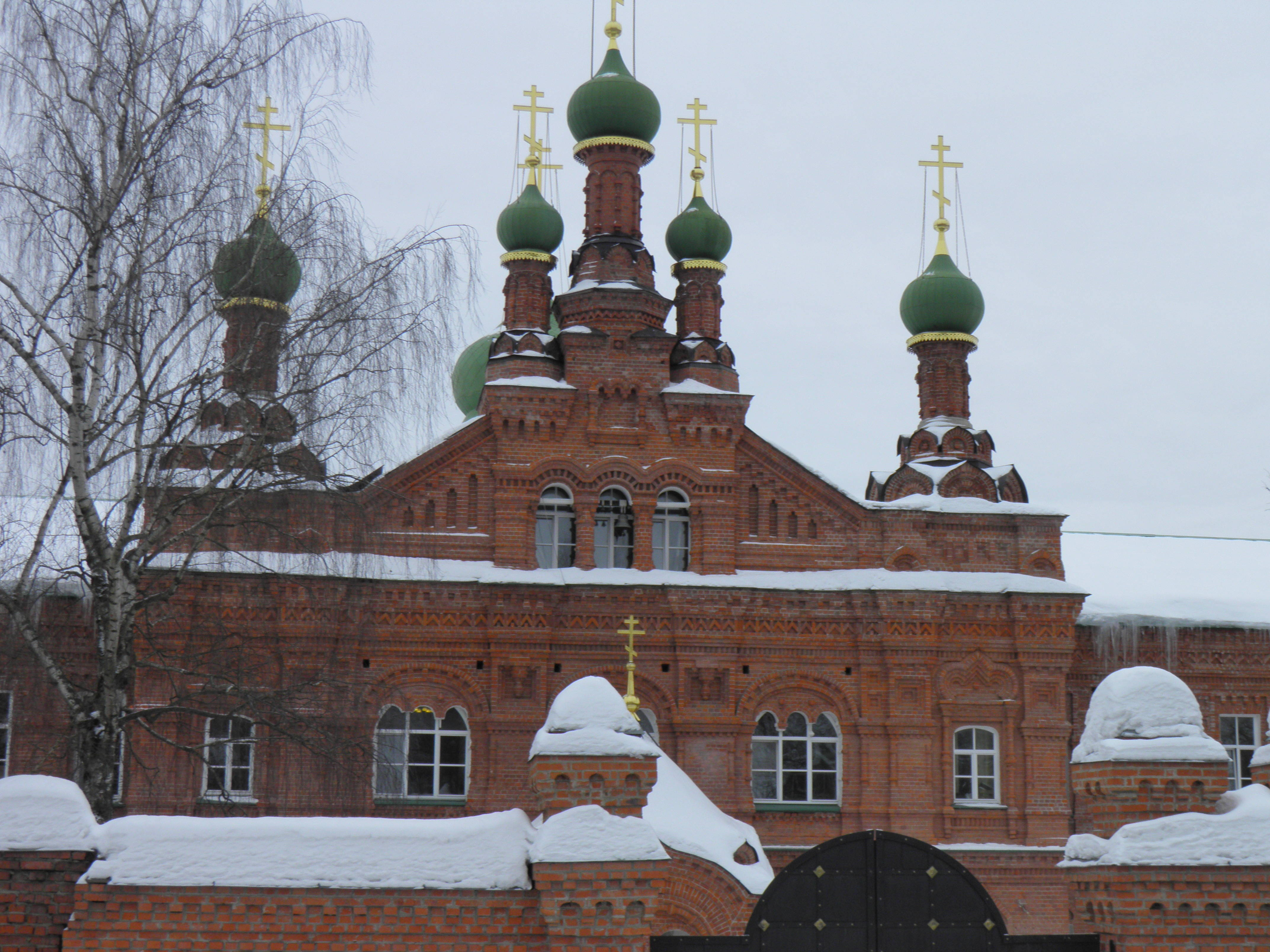 Laure de la Sainte-Trinité à Serguiev Possad (Russie).